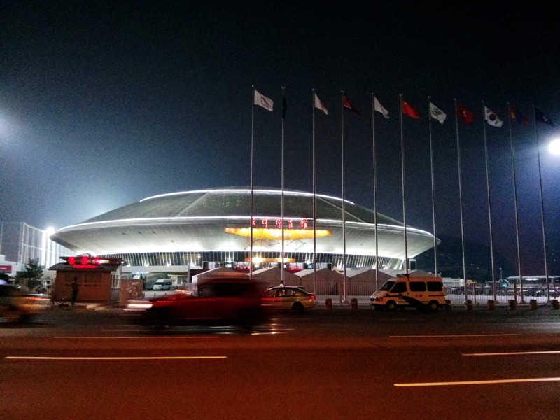 天津体育馆20131003